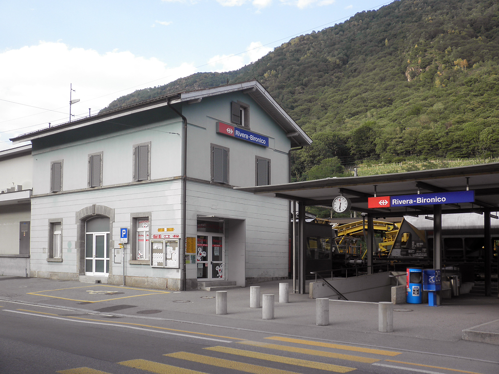 Stazione ferroviaria di Rivera-Bironico